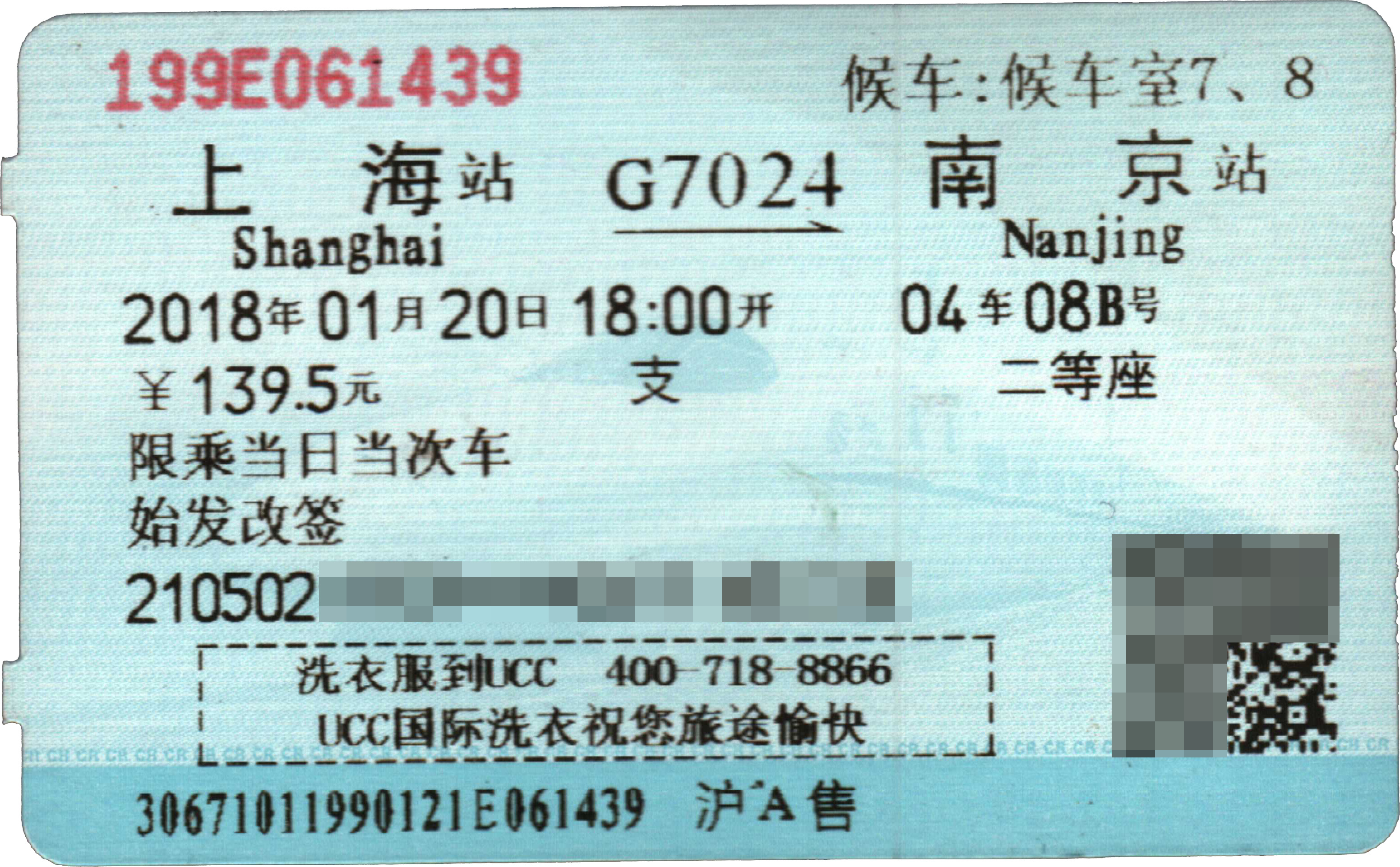 一张中国高铁车票，附带商业广告信息，部分个人隐私信息已被抹去